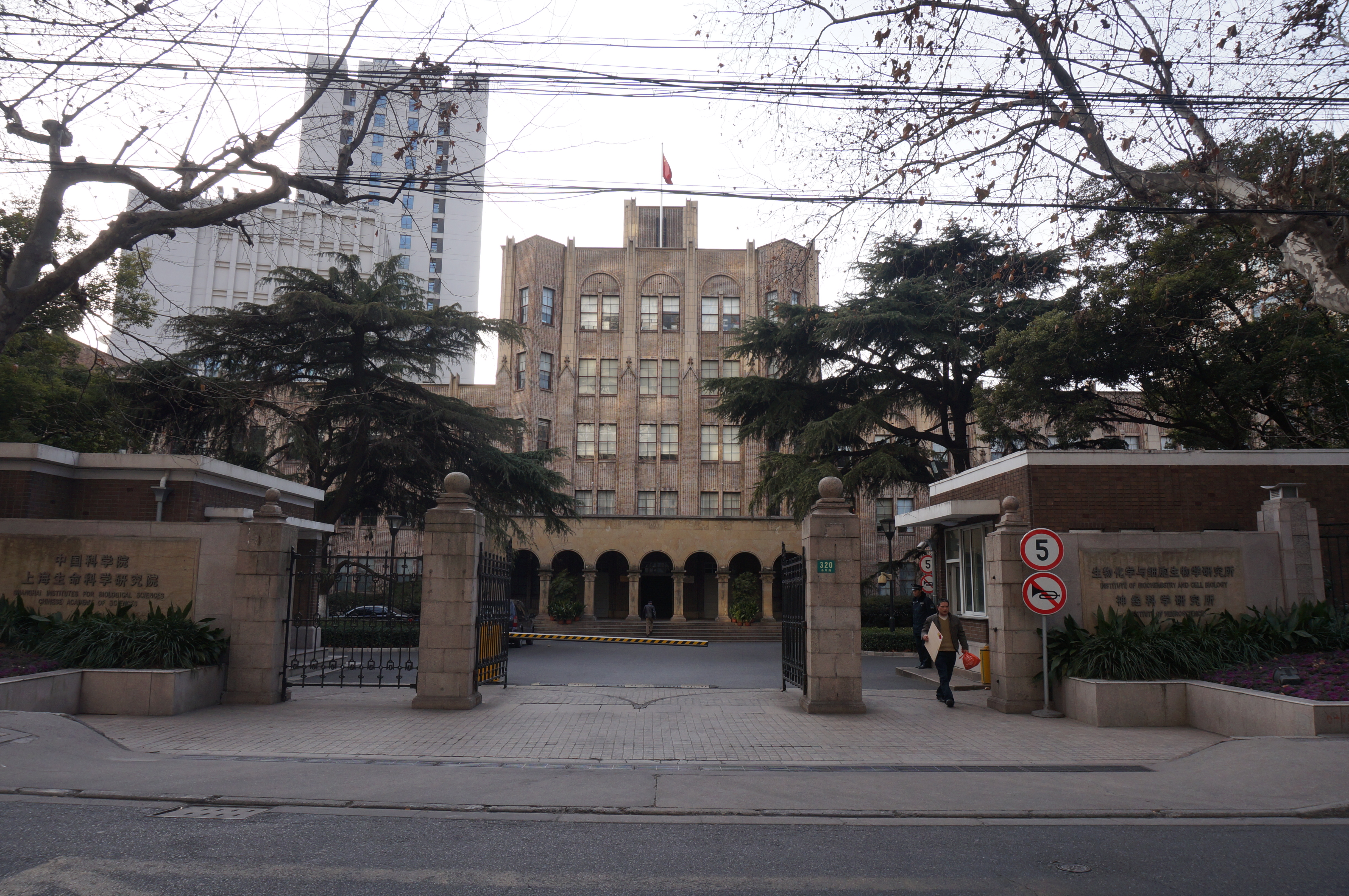 中文（中国大陆）: 上海市第二批优秀历史建筑——岳阳路320号